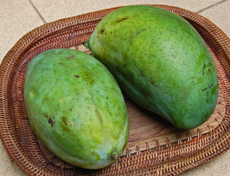 Mangga manalagi situbondo, a kind of mango, Mangifera indica from Situbondo, East Java, Indonesia